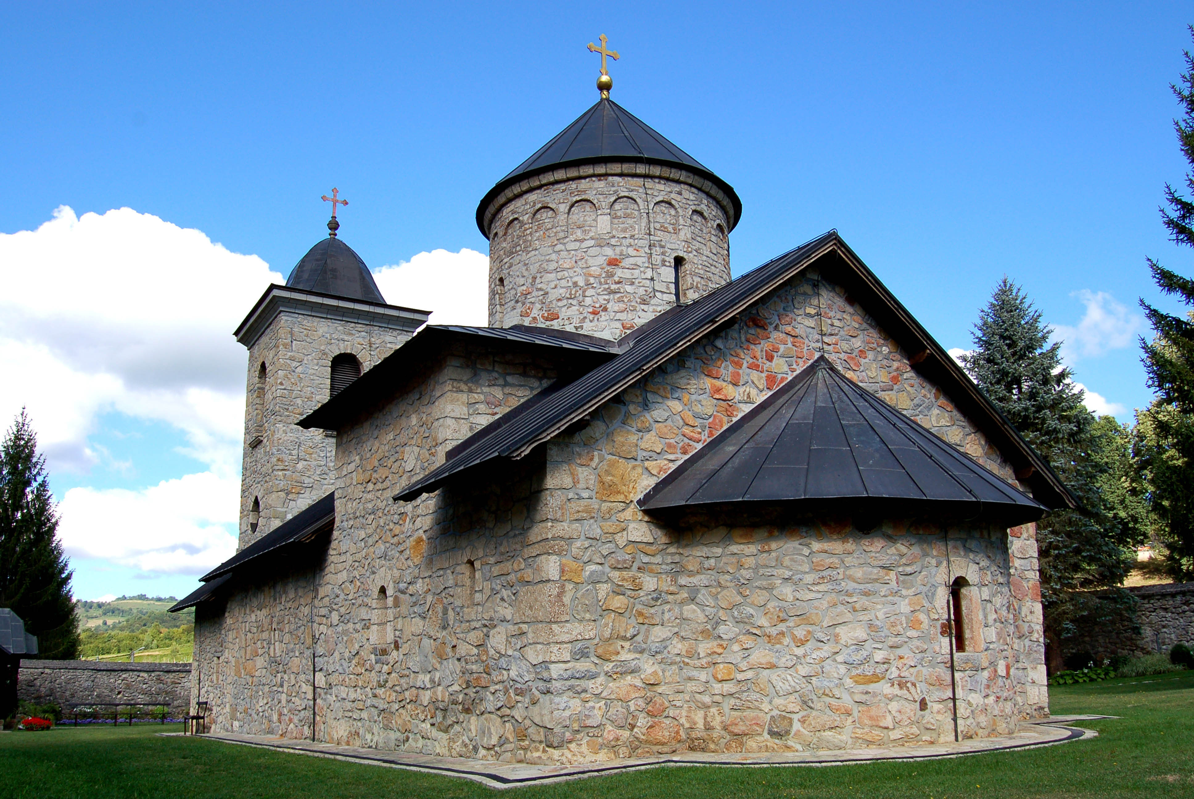 tos16rs NKD168 Манастир Гомионица са црквом посвећеном Ваведењу Пресвете Богородице налази се 42 км западно од Бања Луке, уз горњи ток истоимене рјечице, заправо њене десне притоке, потока Матаваза. Брзе и бистре планинске воде и шумовите стрмине Пилиповића брда, Козијерца и Кика, ишаране пашњацима, дају скровитој гомионичкој околини живописност и бујну љепоту недирнуте природе.